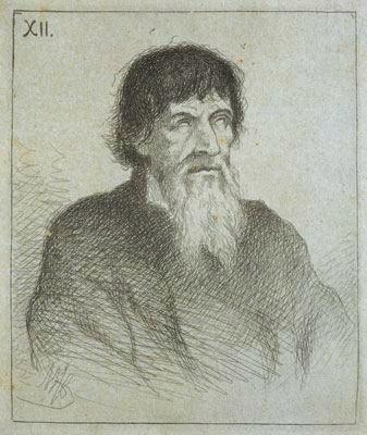 Кобзар Андрій Шут. З рисунка П.Куліша і гравюри Л.Жемчужникова в „Живописній Україні” 1861